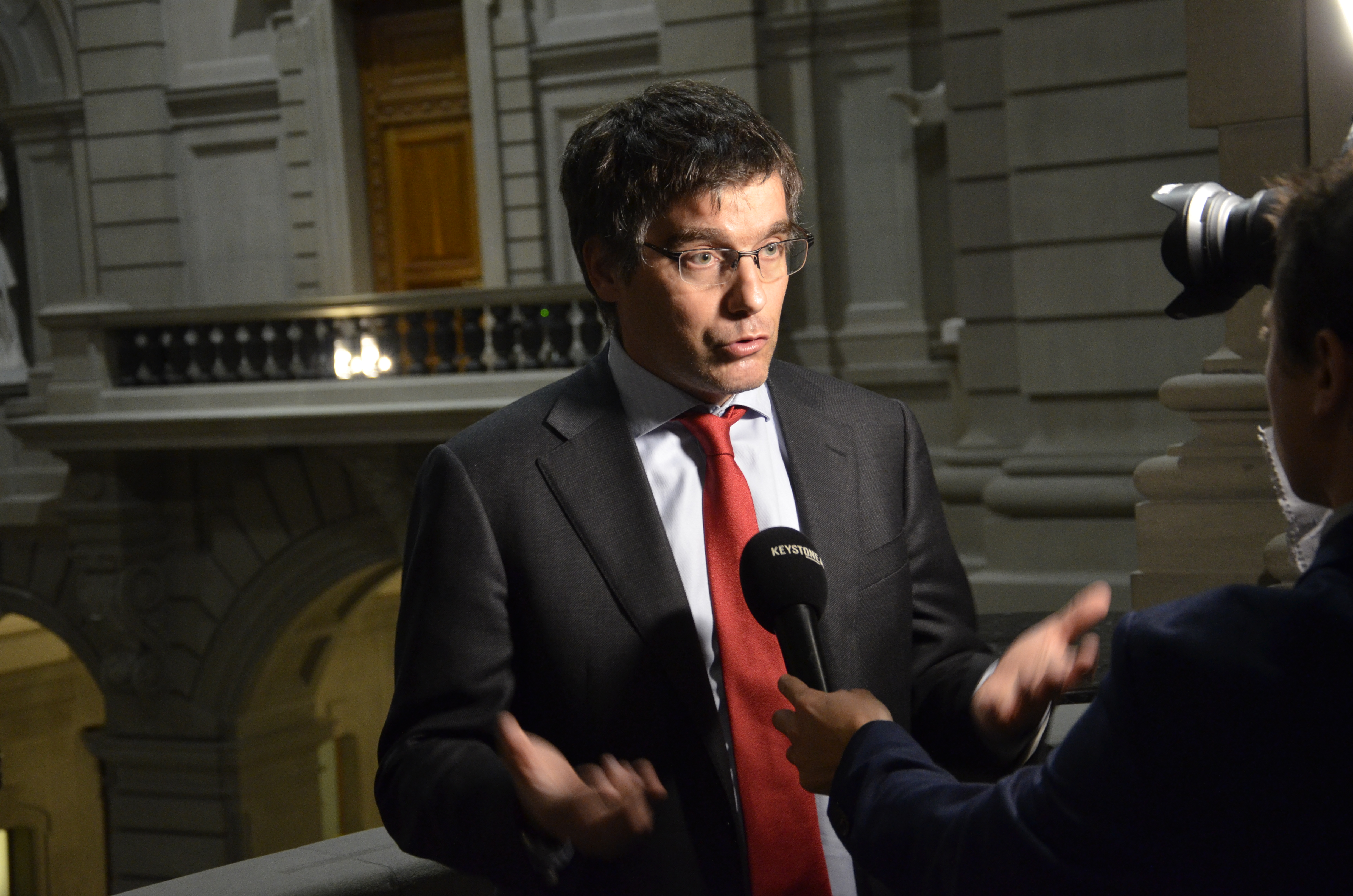 Schweizer Parlamentswahlen 2019: Roger Nordmann, SP-Fraktionspräsident im Bundeshaus